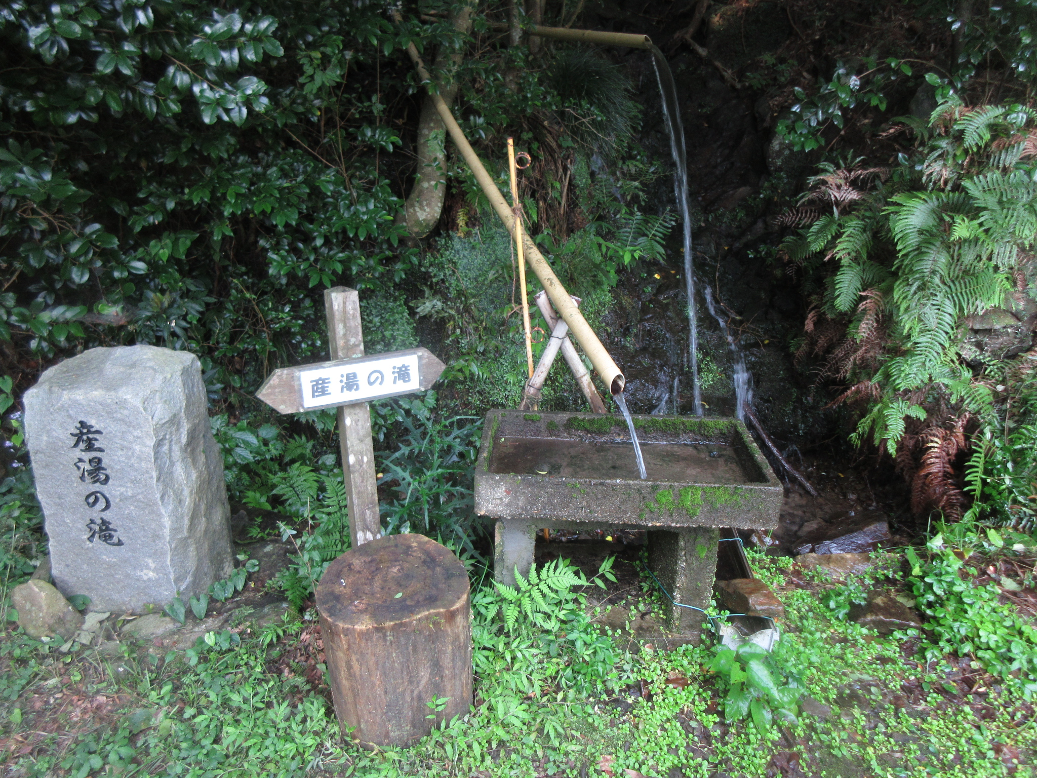 鳥川ホタルの里湧水群（岡崎市鳥川町）